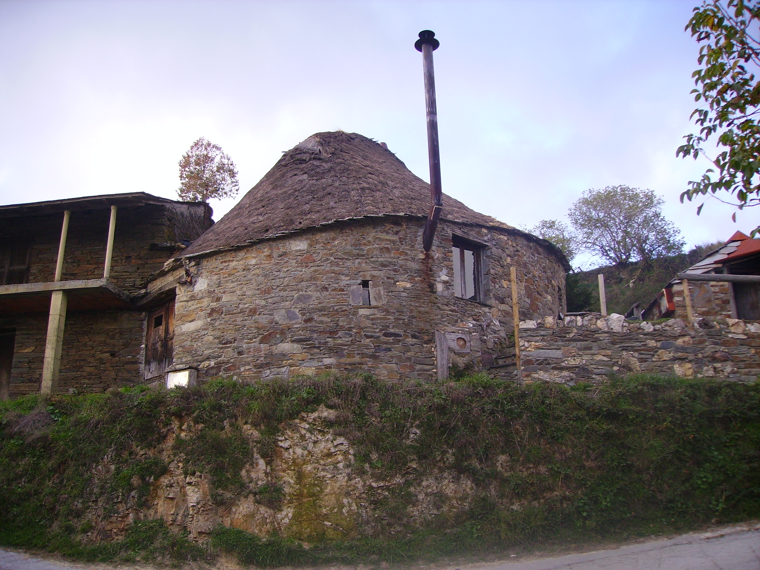 Palloza en Cantexeira